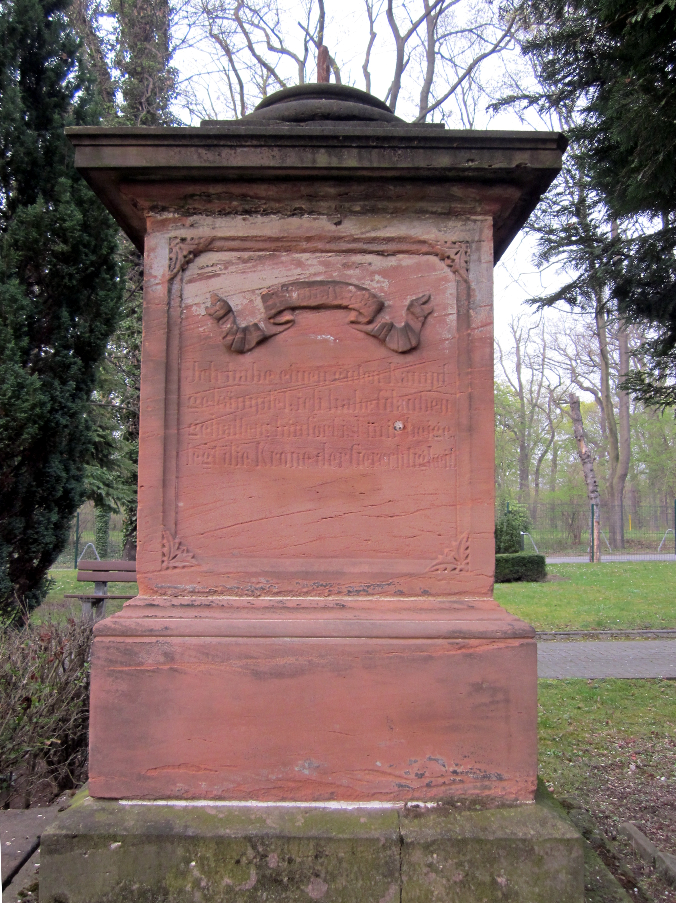 Friedhof Weißenfels: (Sockel des) Denkmal(s) für die Gefallenen des Deutsch-Französischen Krieges 1870/71